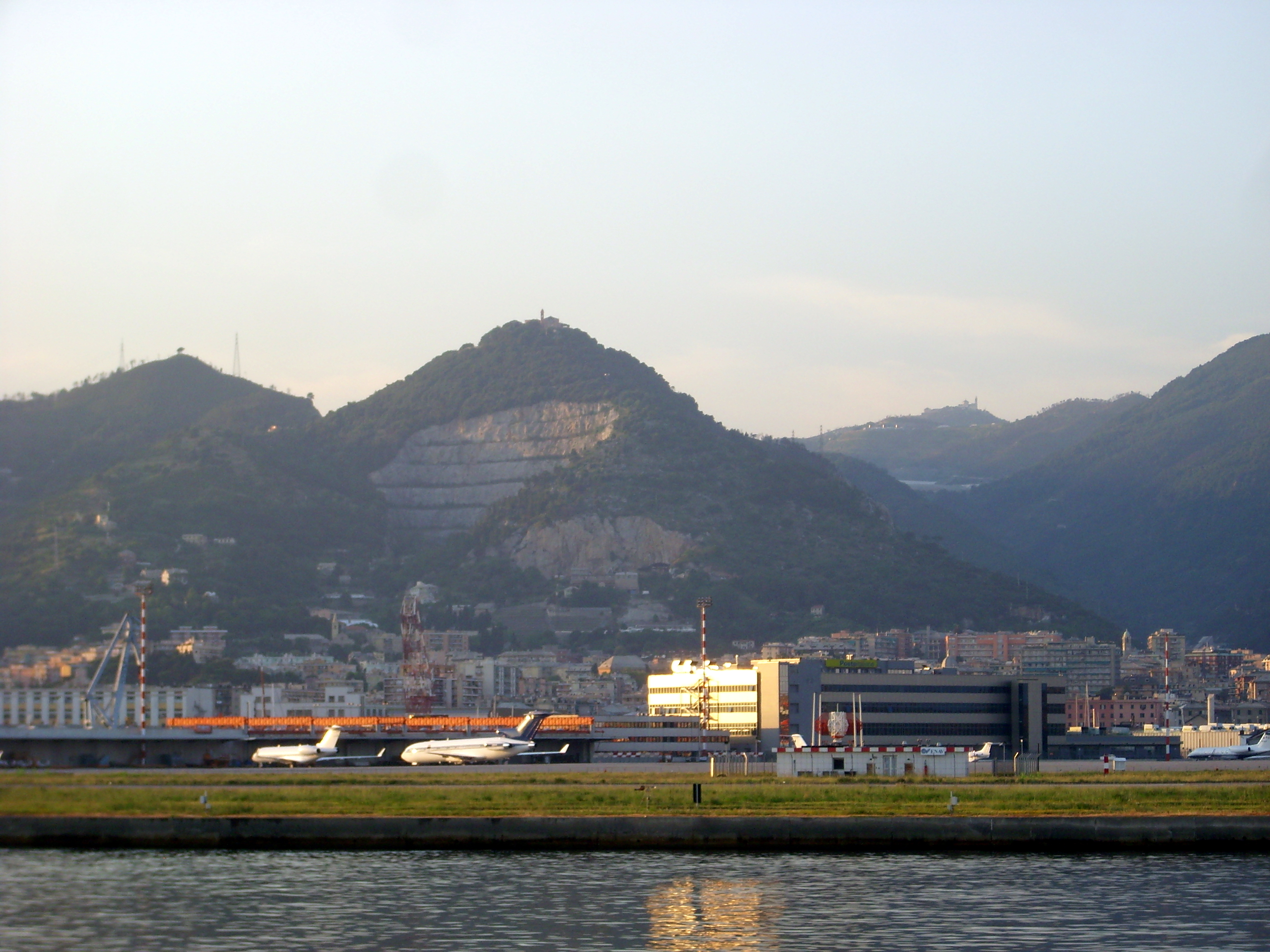 Le alture dietro Sestri Ponente, viste dalla Navebus. In primo piano l'aereoporto di Genova.